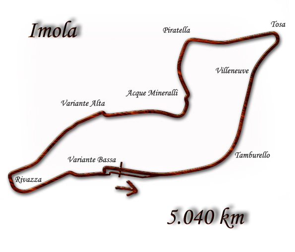 San Marino Grand Prix Formula 1 /1981-1994/ Autor: Jiří Žemlička